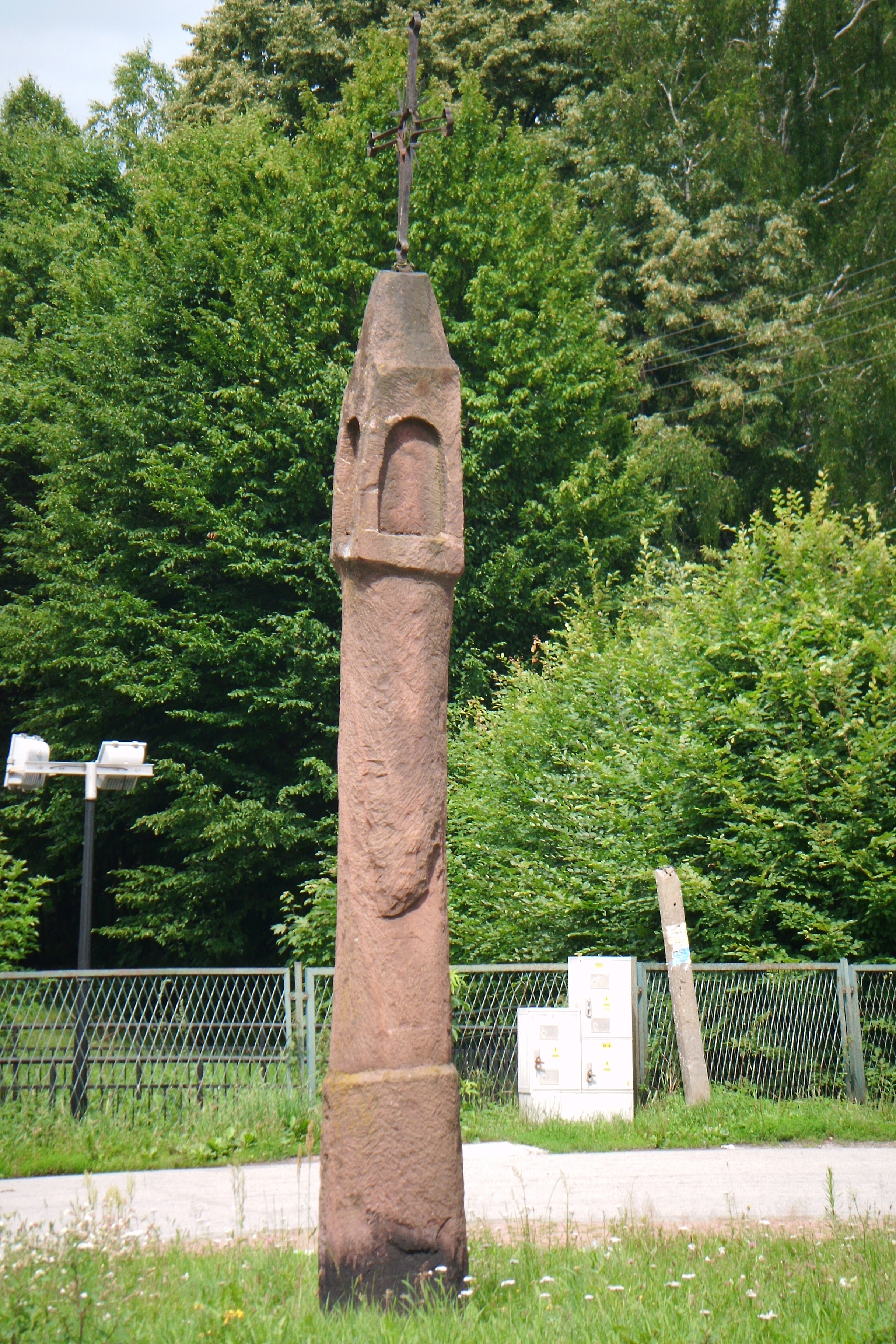 kamienny drogowskaz w Samsonowie obok ruin Huty "Józef"